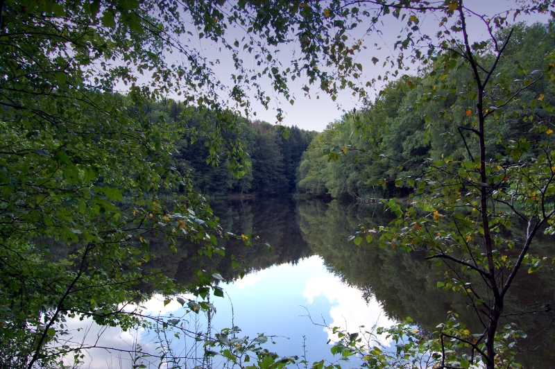 Weiher in Neunkirchen-Heinitz (Saarland)